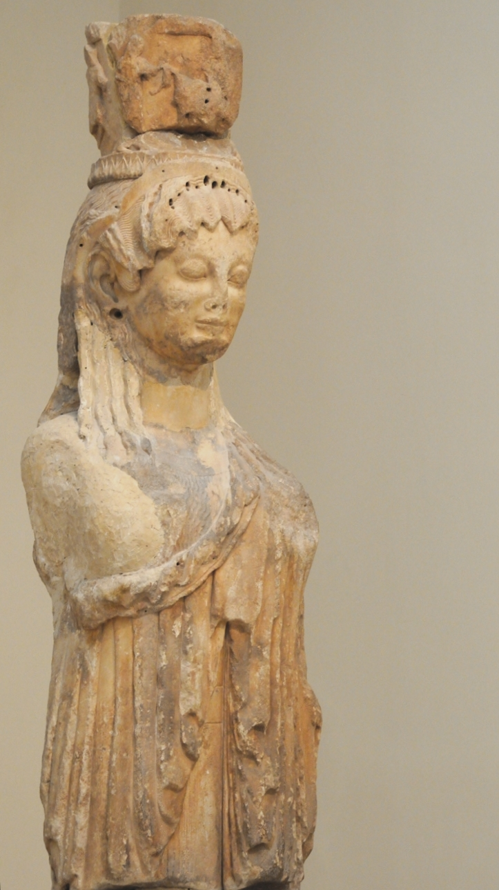 Caryatide en marbre qui devait se trouver à l'entrée du trésor de Siphnos, construit à Delphes en 525 av. J.-C.